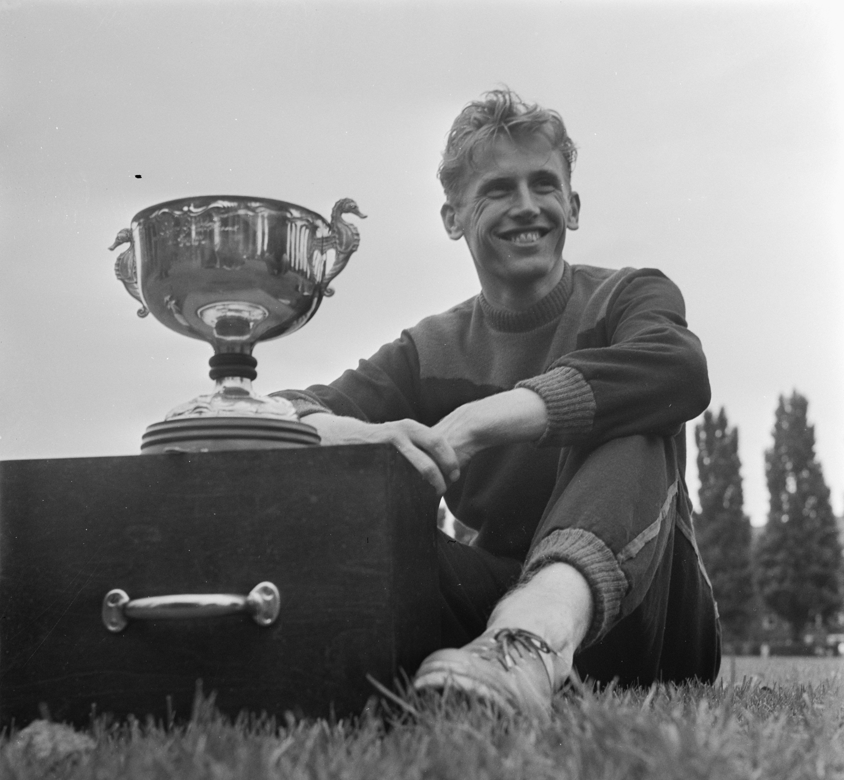 Collectie / Archief : Fotocollectie Anefo Reportage / Serie : [ onbekend ] Beschrijving : Hans Harting Datum : 16 september 1951 Persoonsnaam : Hans Harting Fotograaf : Noske, J.D. / Anefo Auteursrechthebbende : Nationaal Archief Materiaalsoort : Negatief (zwart/wit) Nummer archiefinventaris : bekijk toegang 2.24.01.03 Bestanddeelnummer : 904-7671